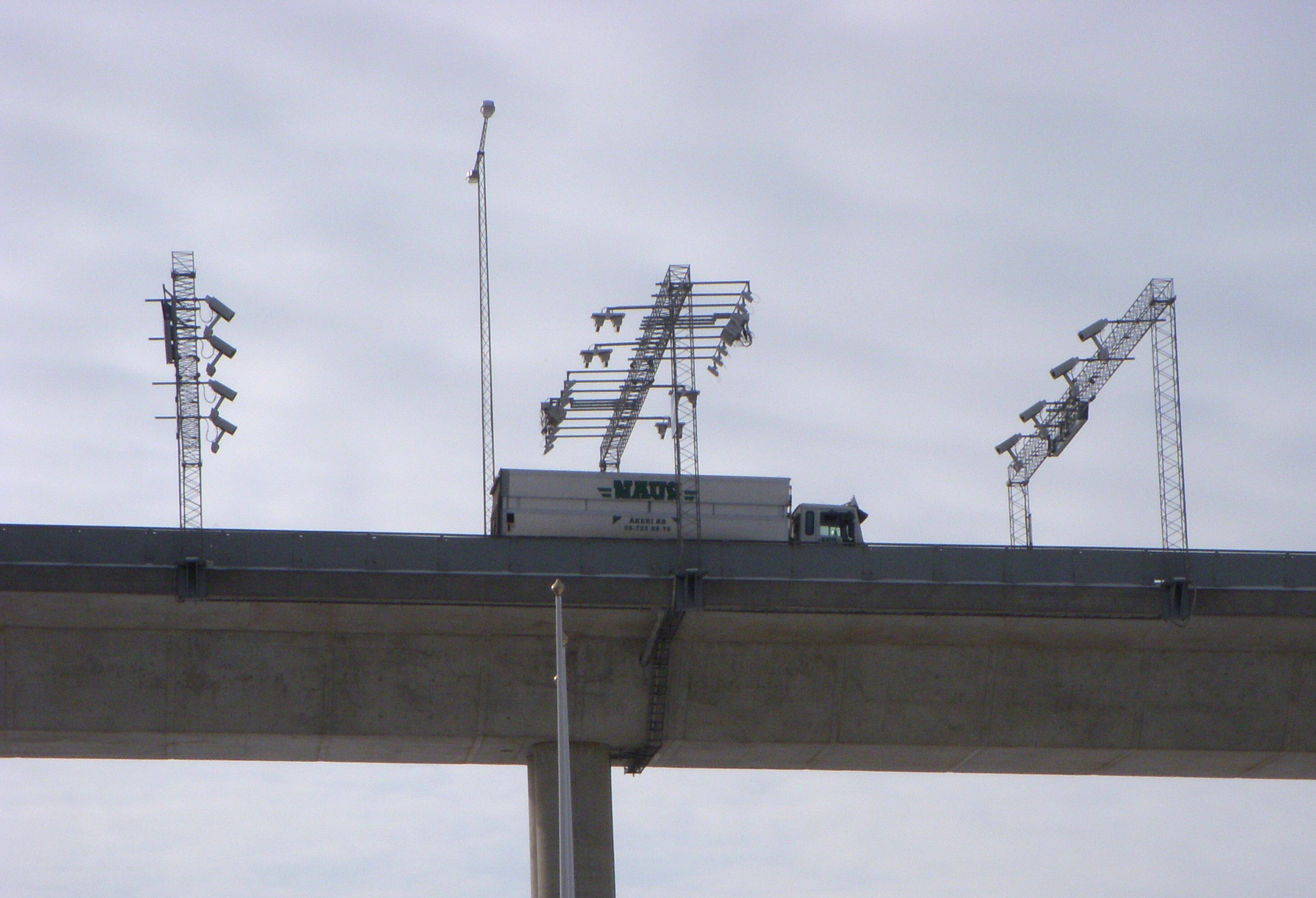 Trängselskattportaler på Johanneshovsbron i Stockholm